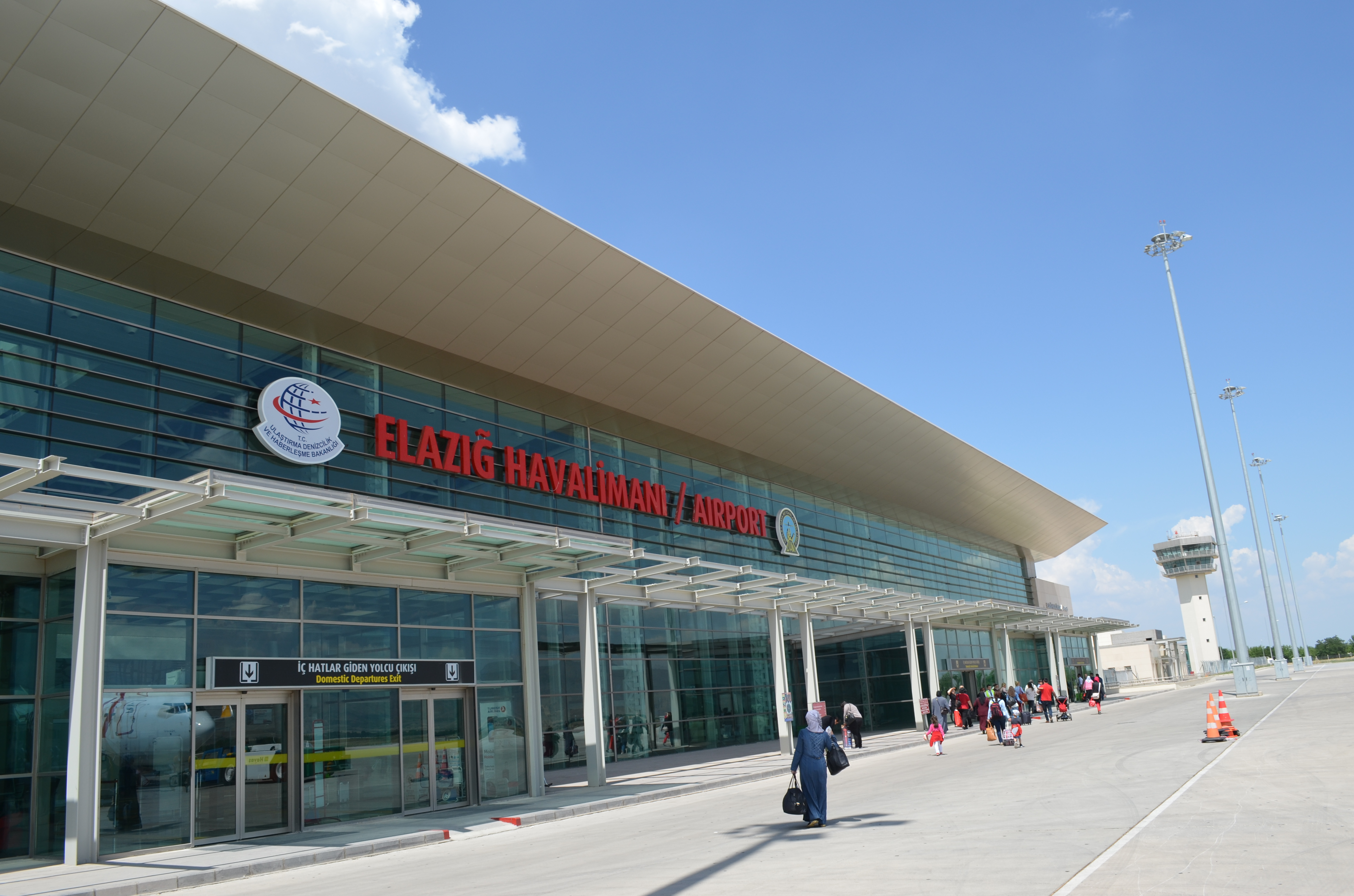 Ankunftterminal des Flughafens Elazığ